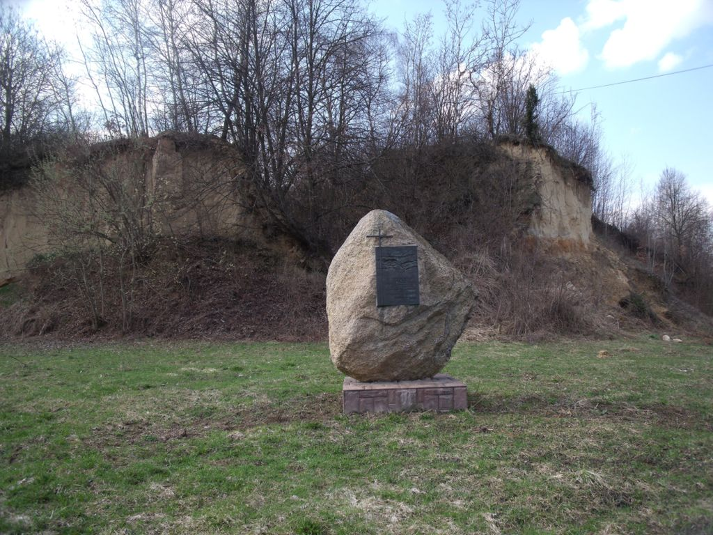 Pomnik upamiętniający walki I Brygady Legionów Polskich w maju i czerwcu 1915 roku.